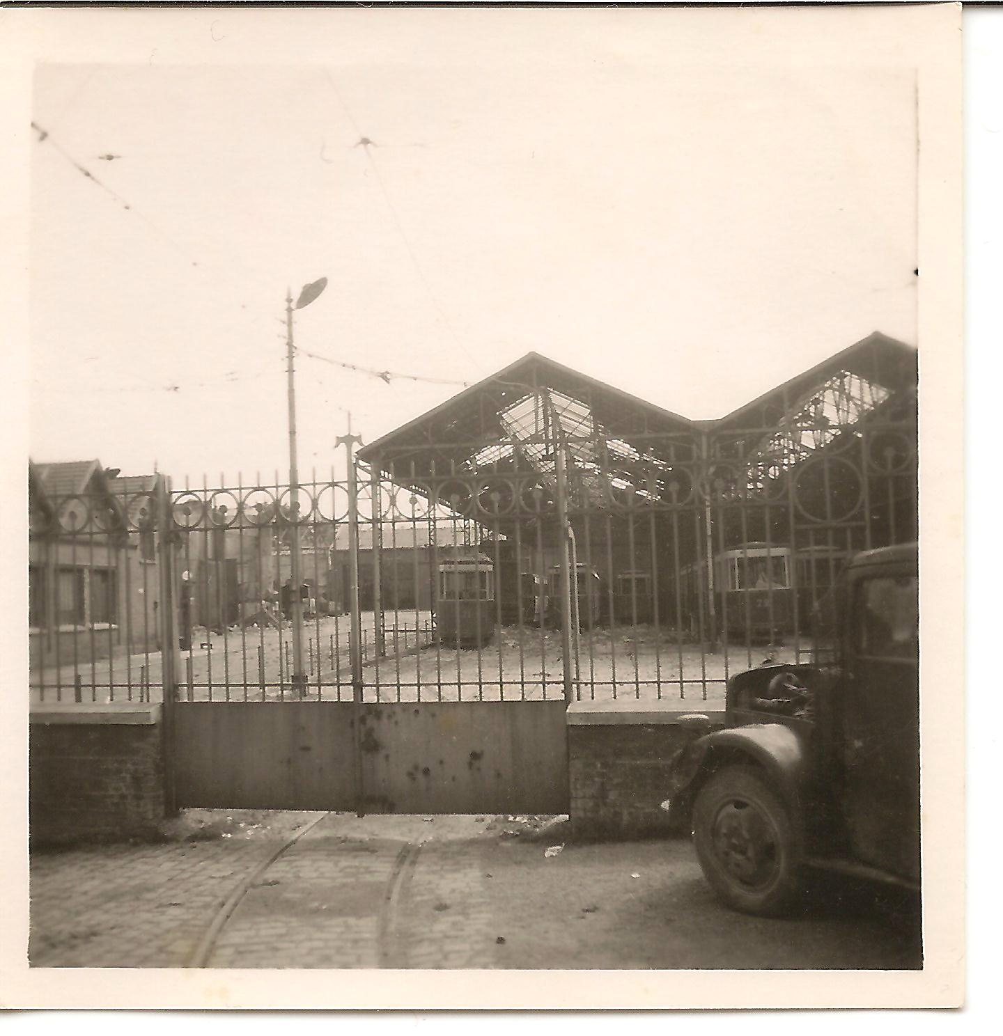 Dépôt du Tramway de Reims en 1940. Photographie prise par un soldat Allemand.